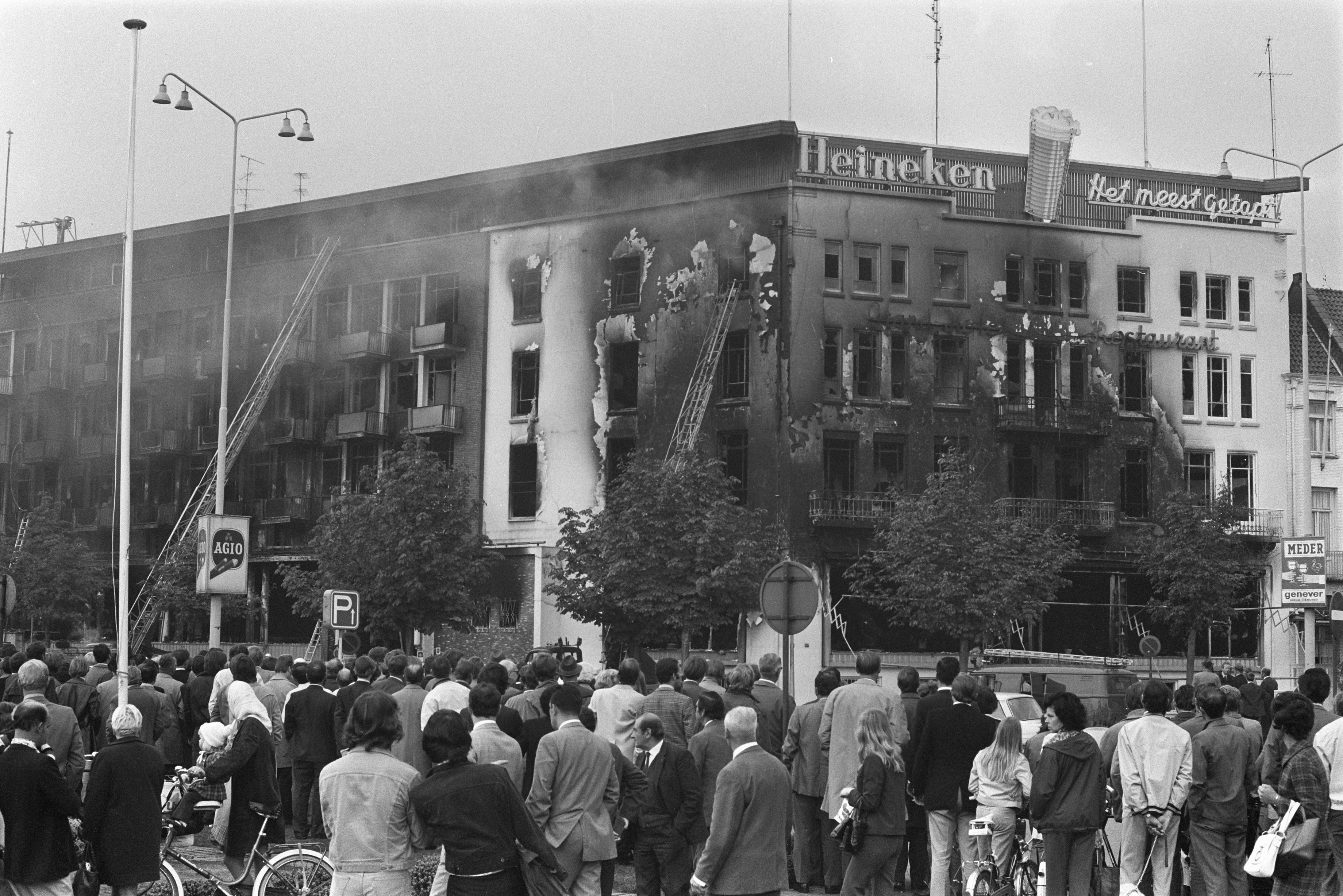 Brand in hotel 't Silveren Seepaerd in Eindhoven: elf doden